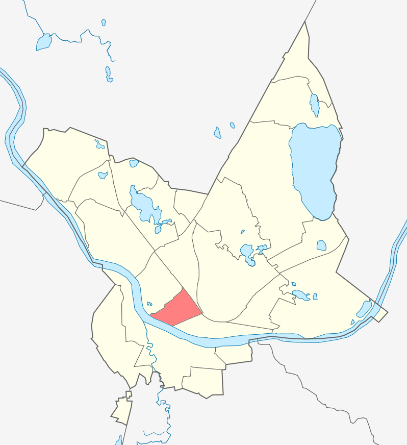 Микрорайон Центр карте Даугавпилса.